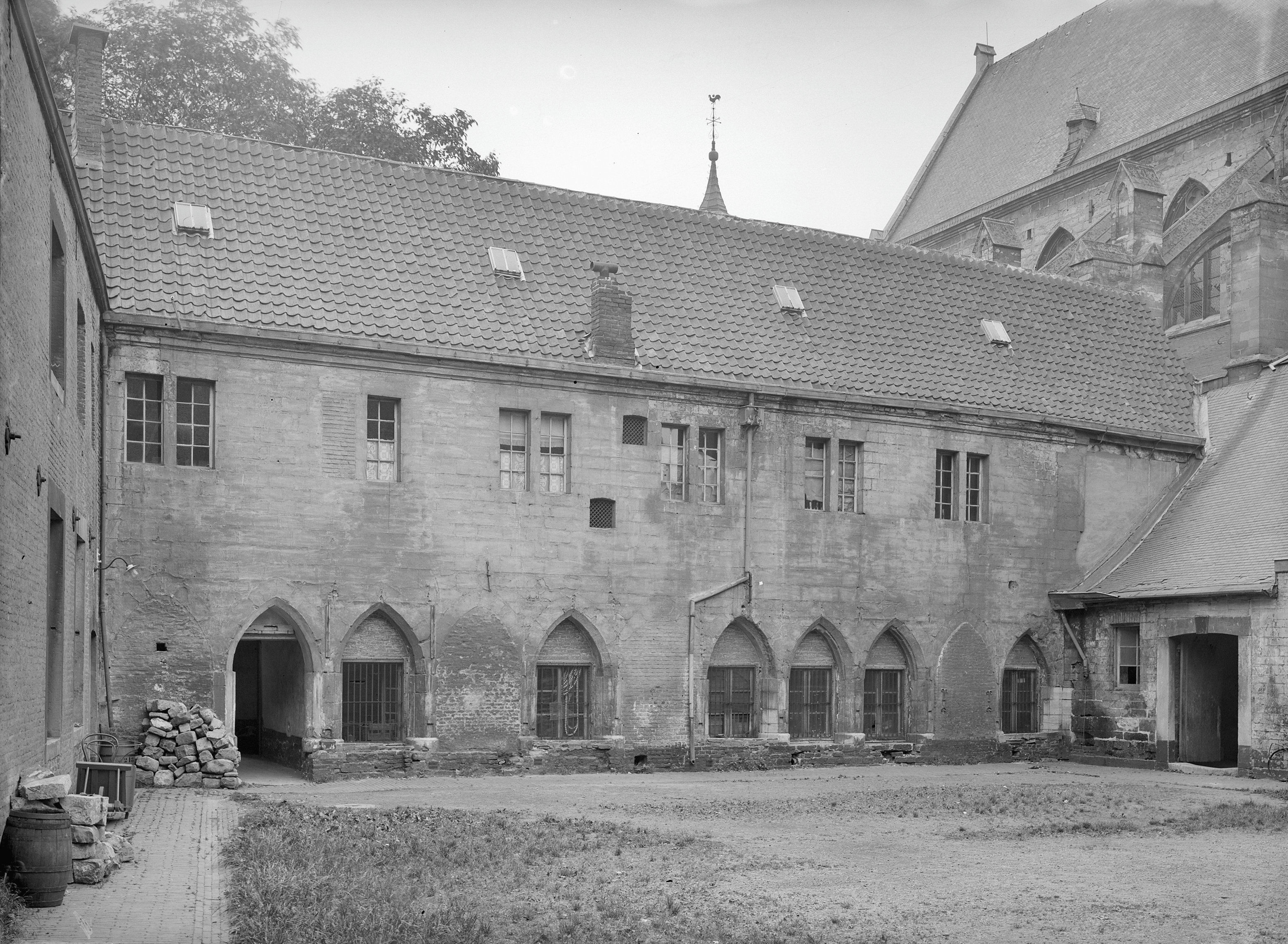 Voormalig Franciscanerklooster: binnenplaats This is a possible Rijksmonument: Find the monument in the Monuments database: in Maastricht All Rijksmonumenten in Maastricht Is this a Rijksmonument? Yes No More information about this project and help. More images to work at in Category:Possible Rijksmonumenten.